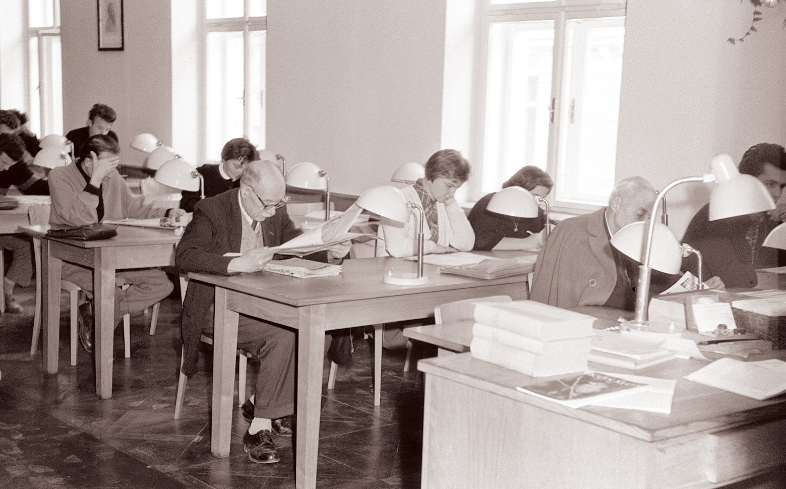 Čitalnica Študijske knjižnice v Mariboru.